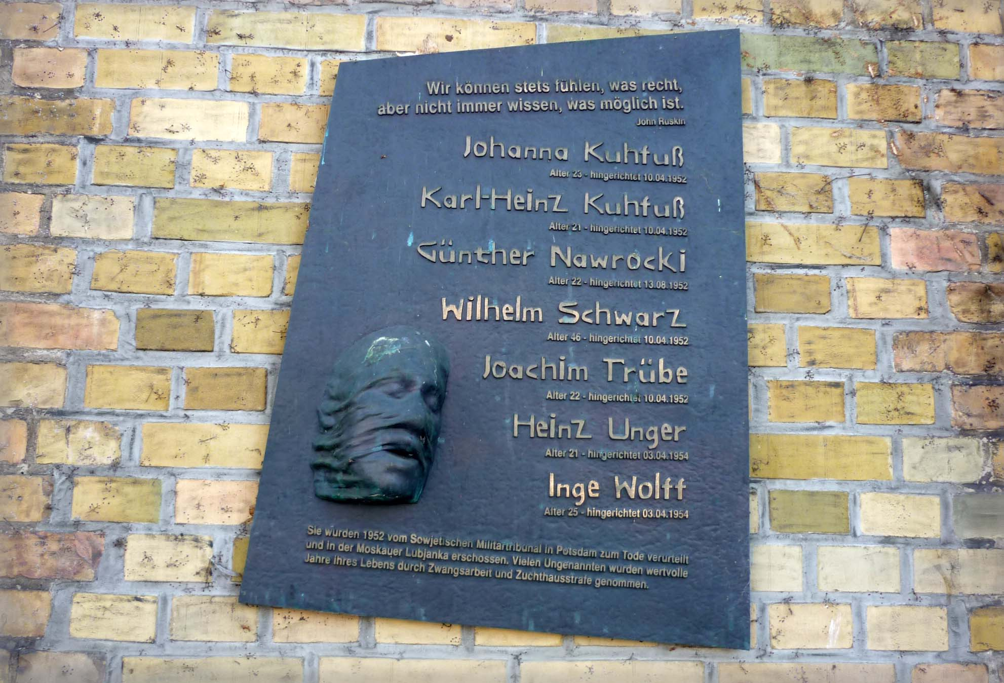 Gedenktafel für 7 in Moskau hingerichtete Widerstandskämpfer an der Carl-von Ossietzky-Schule in Werder (Havel)